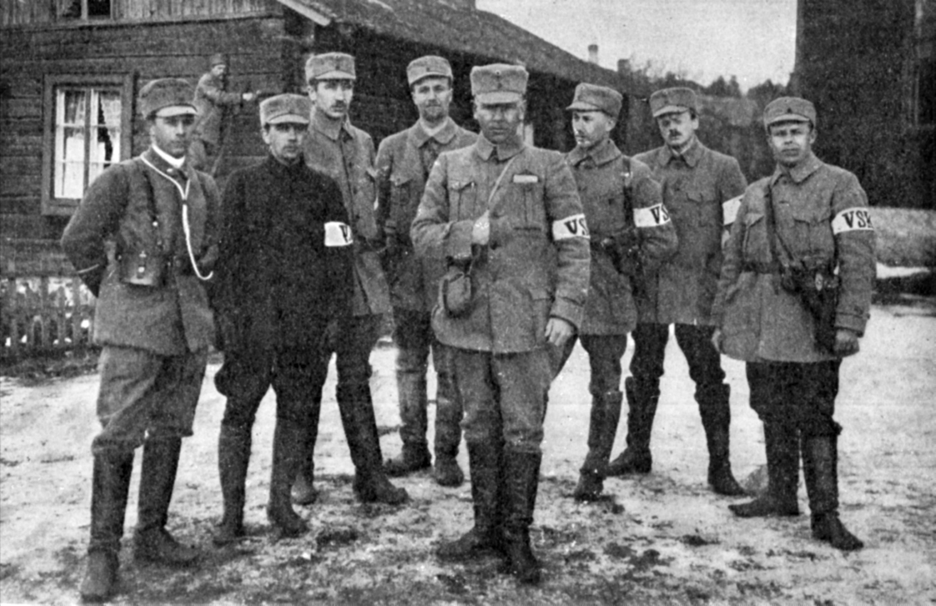 Description